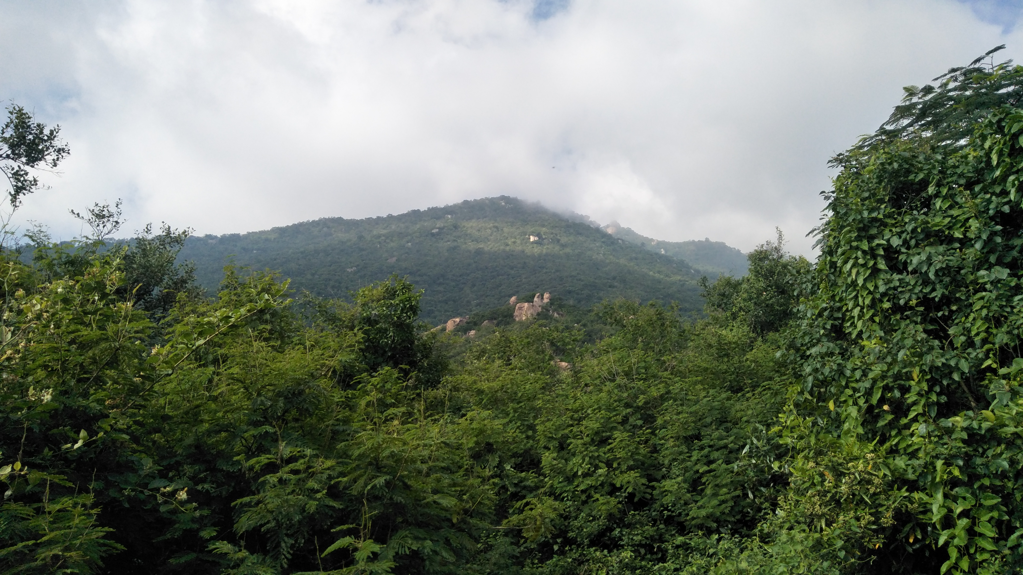 hill